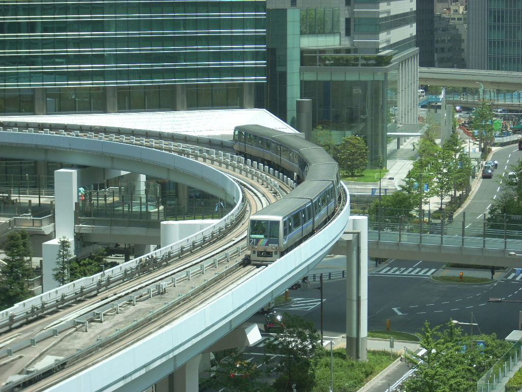 Yurikamome shiodome